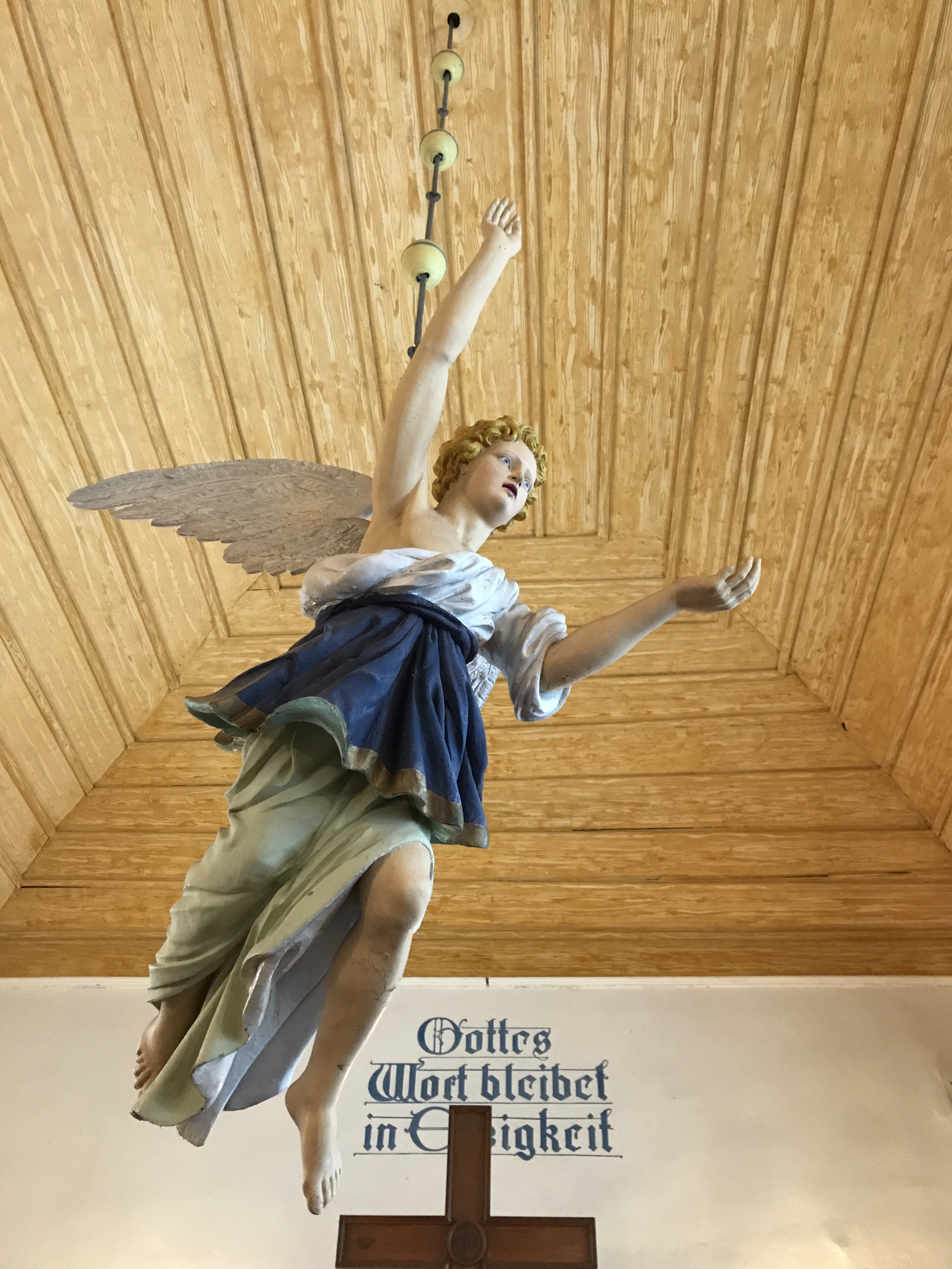 Die Dorfkirche Ließen ist eine barocke Saalkirche aus dem frühen 18. Jahrhundert und gehört zur Stadt Baruth/Mark im Landkreis Teltow-Fläming in Brandenburg. Im Innern hängt unter anderem ein Taufengel aus dem Anfang des 18. Jahrhunderts.